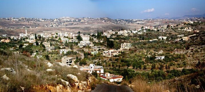 منظر عام للبلدة من محلة البلايط - بلدة عبا - جنوب لبنان